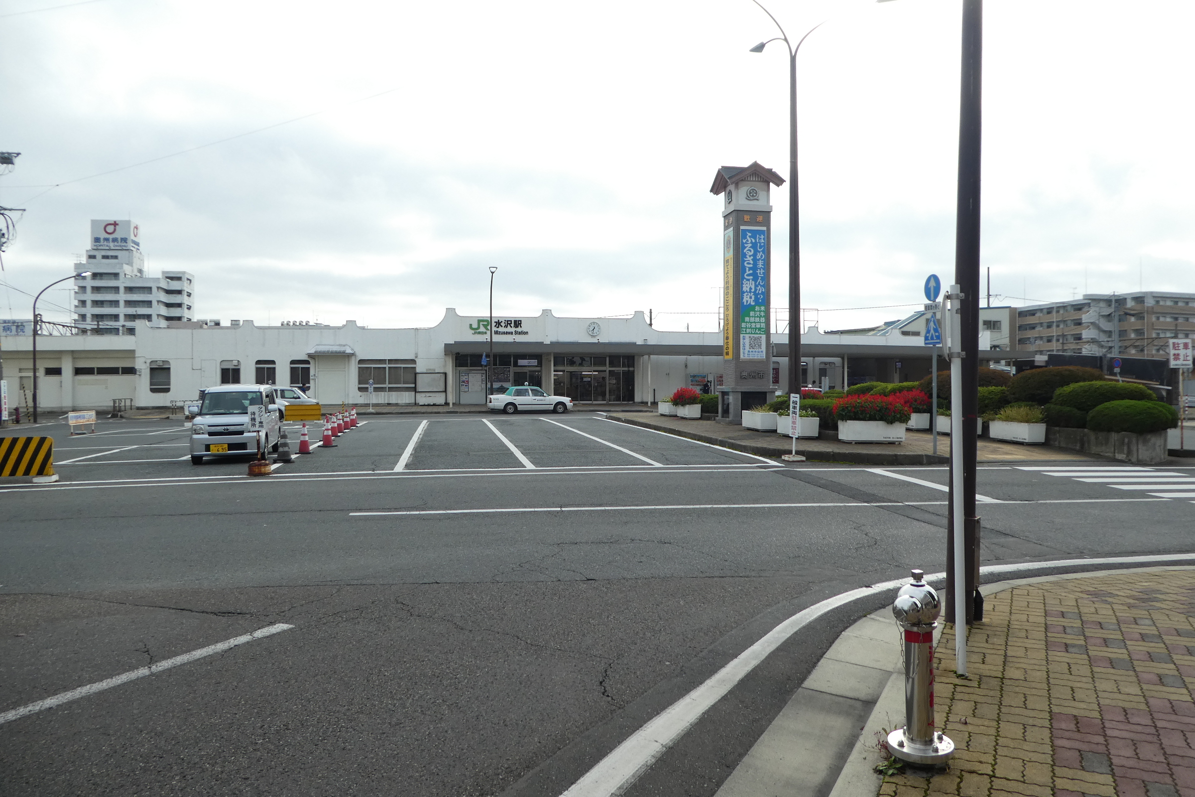 JR東北本線水沢駅駅舎